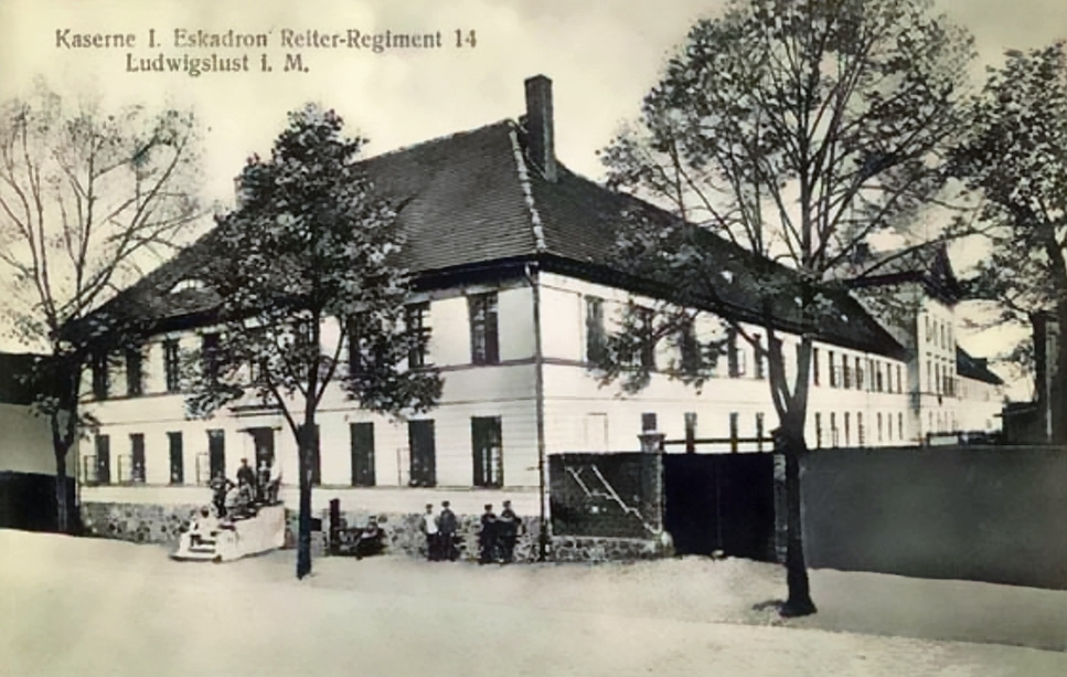 Kaserne der Ludwigsluster Dragoner, später der I. Eskadron des Reiterregiments Nr. 14.